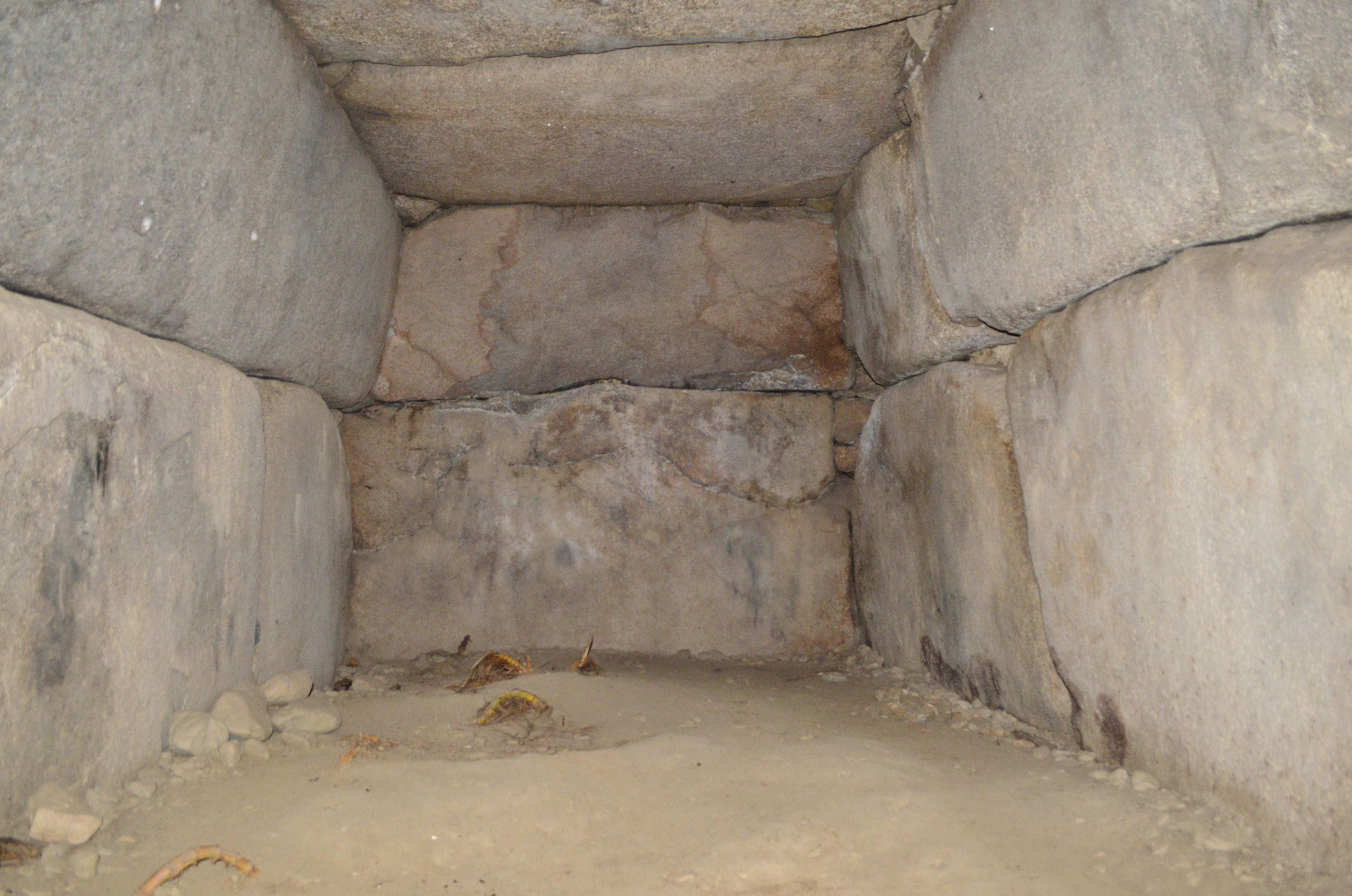 峯塚古墳 石室玄室